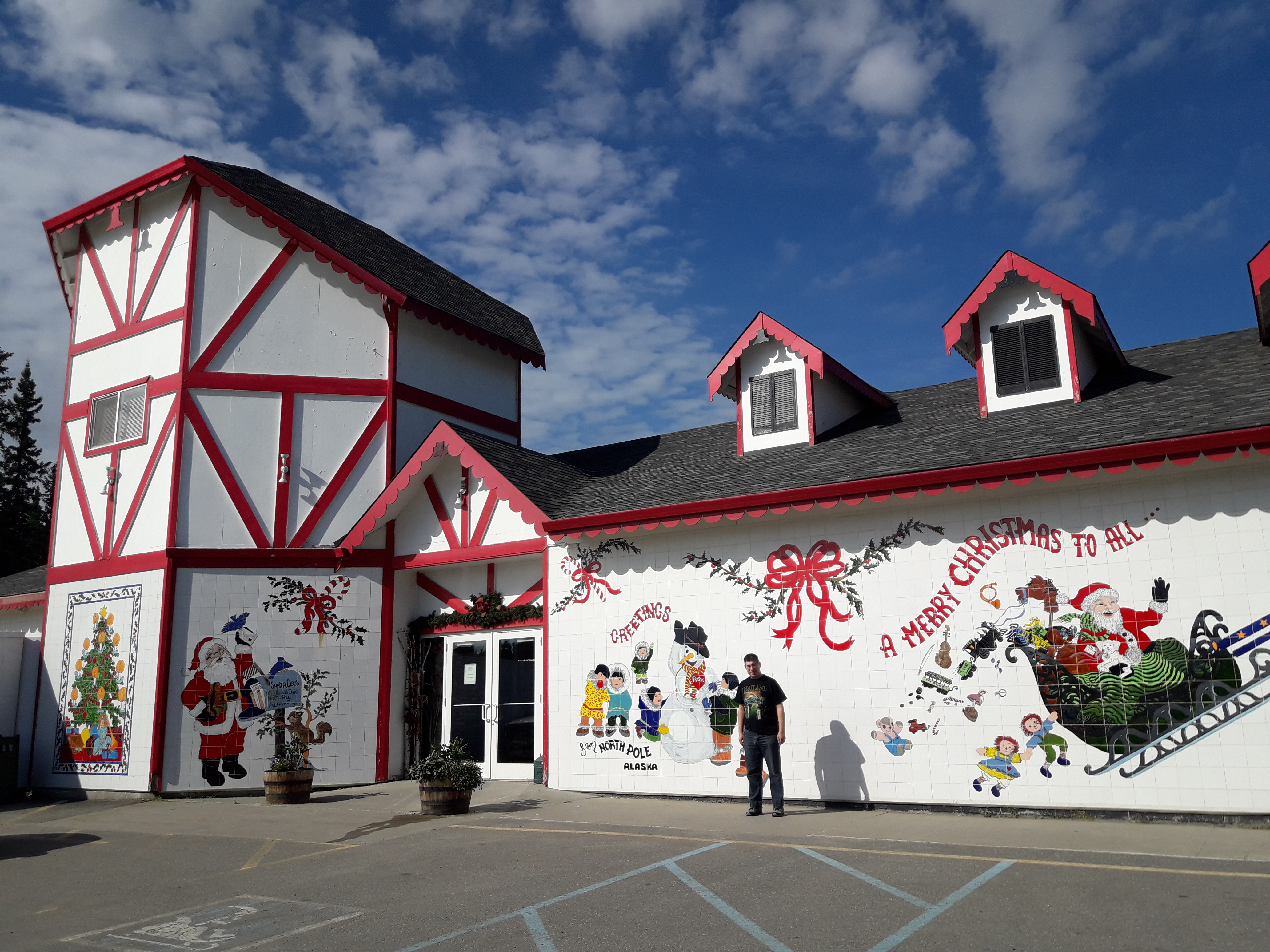 North Pole, Alaska